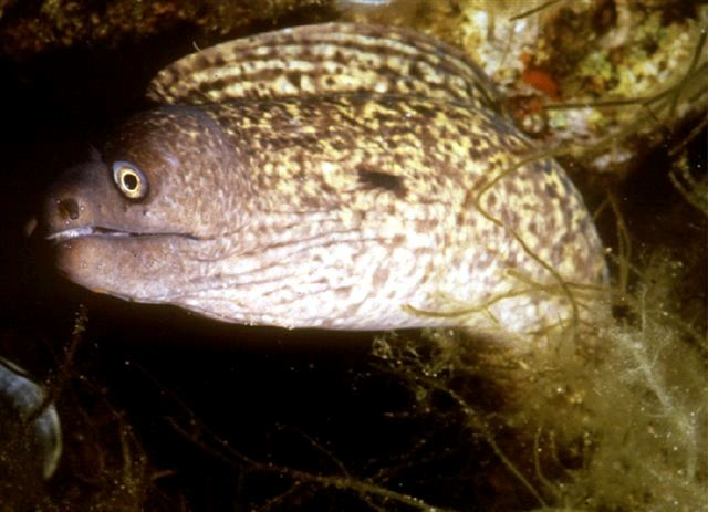 Area Marina Protetta Capo Gallo, Palermo, Sicily Muraena helena